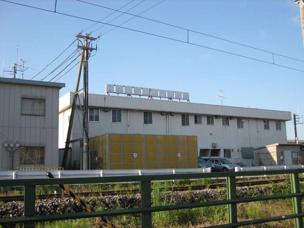 新潟貨物ターミナル駅駅舎